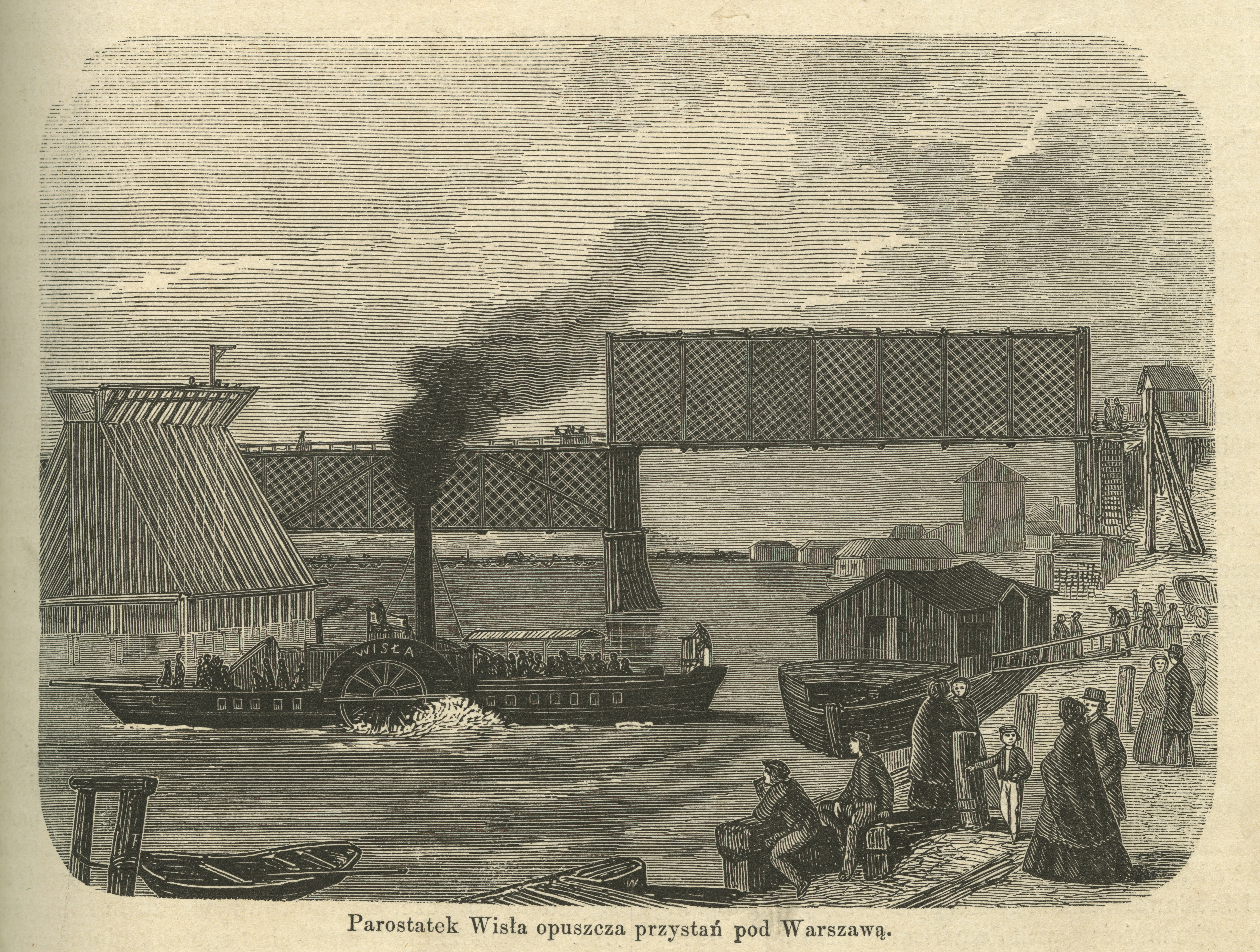 Parostatek Wisła opuszcza przystań pod Warszawą